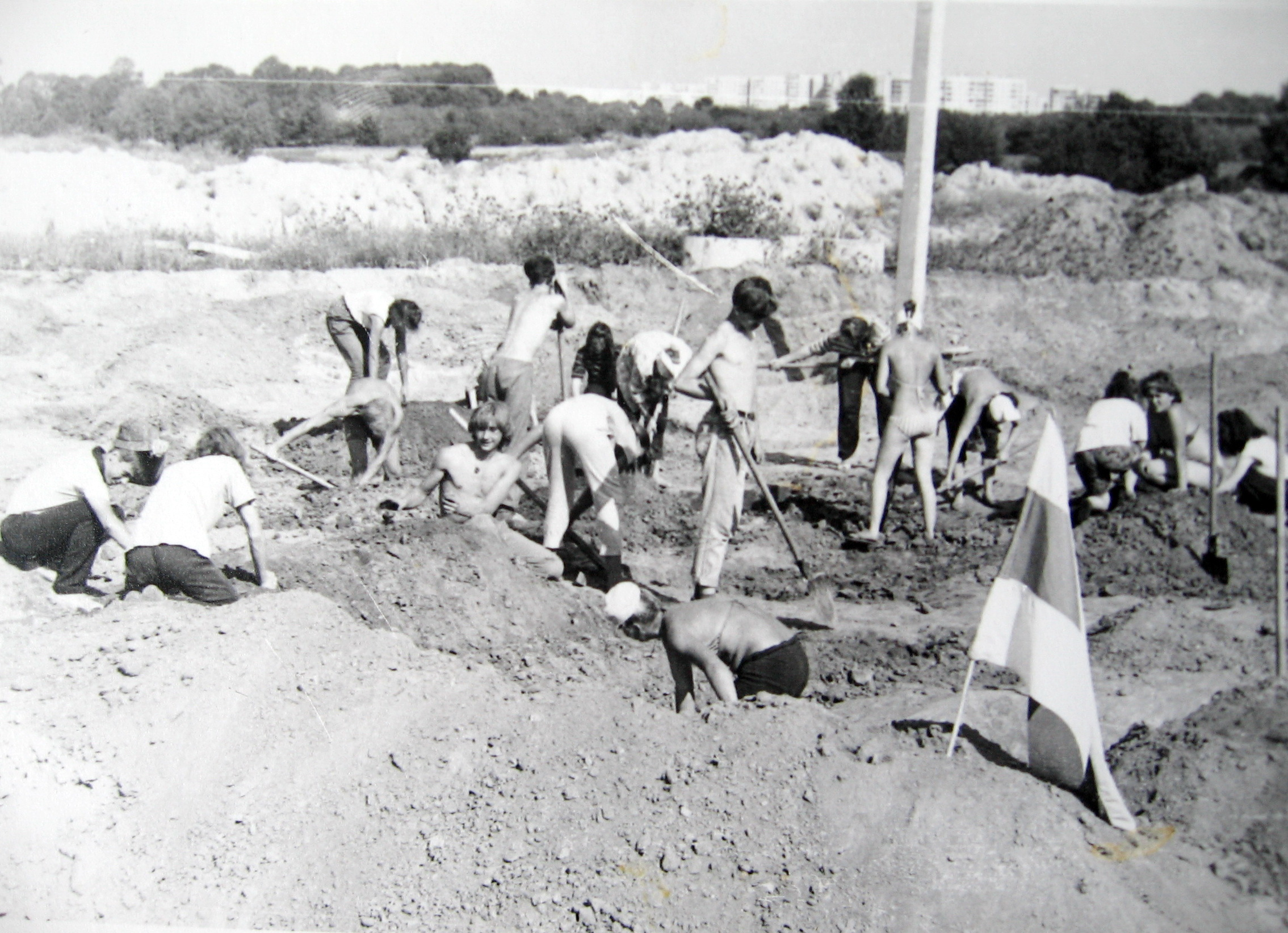 Беларуская (тарашкевіца): Прыманьне ўдзелу ў архiялягiчных раскопах